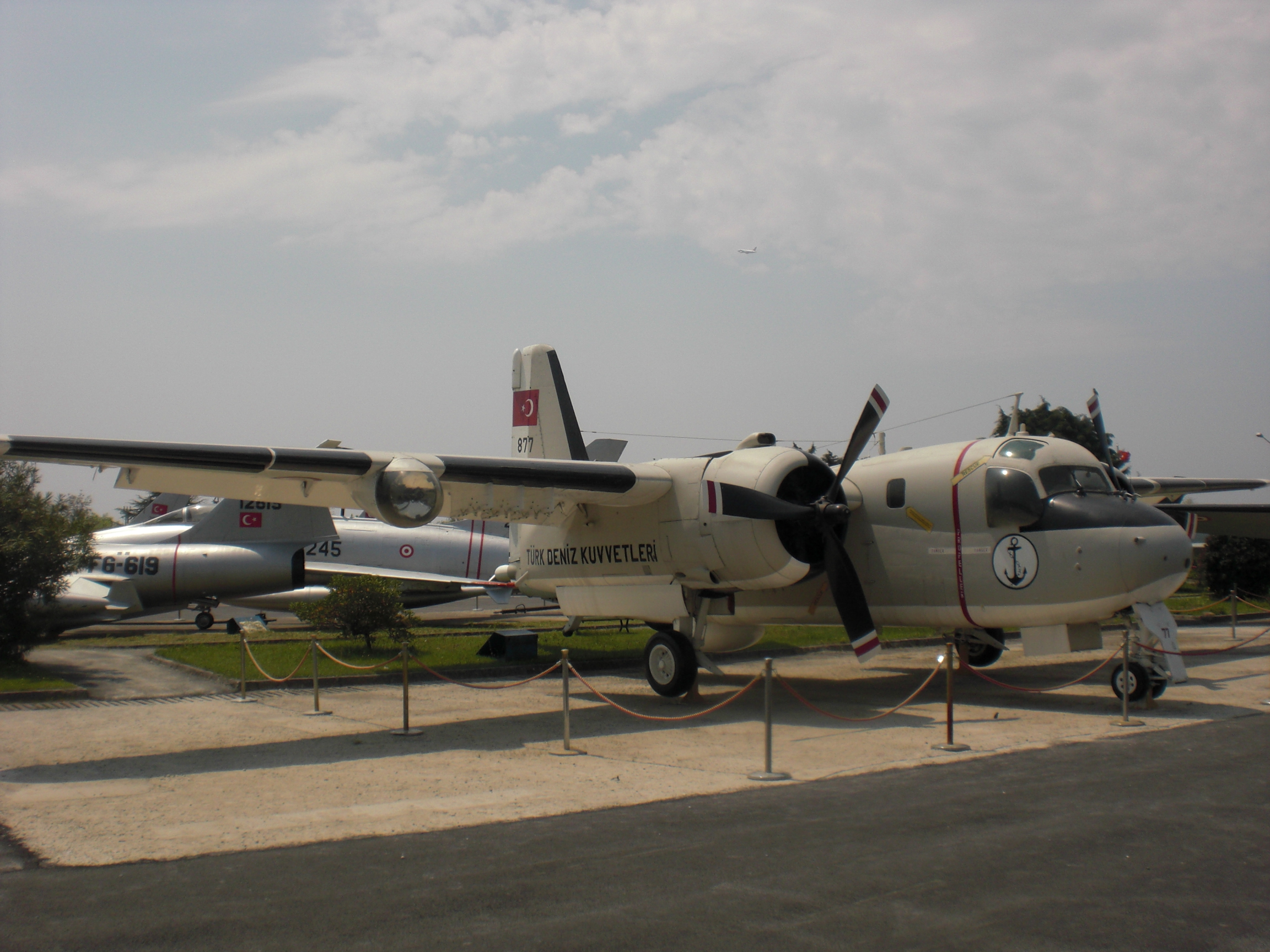 Havacılık Müzesi'n de aktif görevden ayrılmış bir S-2e Tracker denizaltı avlama uçağı